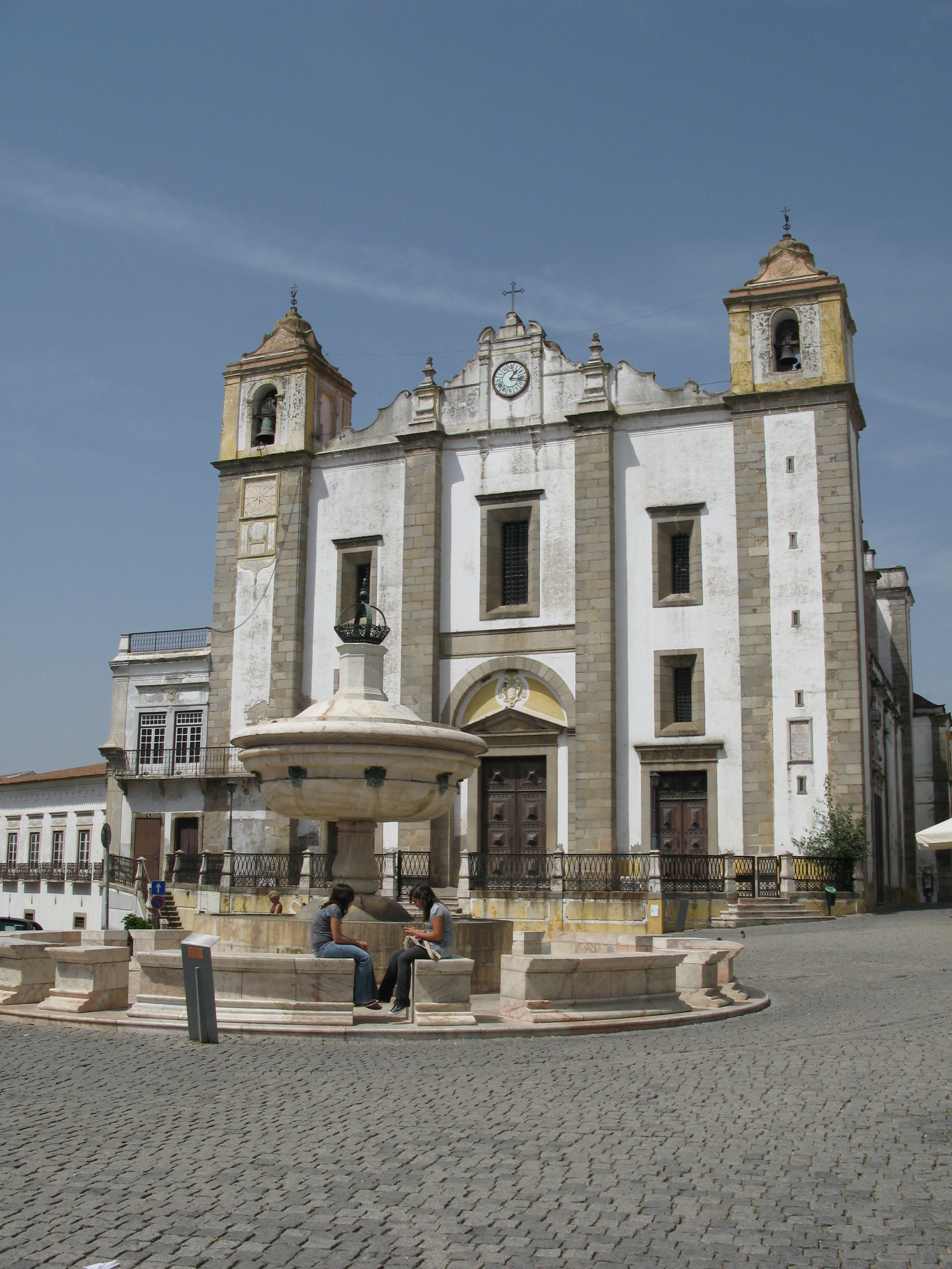 Santo Antao Church in Évora, Portugal